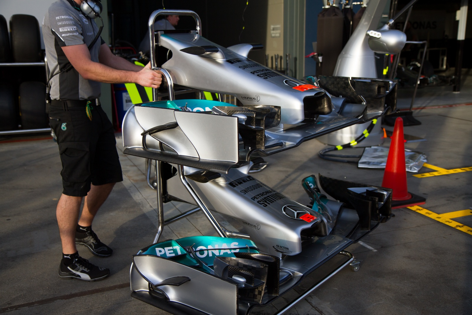 Mercedes F1 W05 framvingar